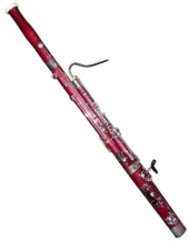 Kleines, aber detailreiches Bild eines Fagotts